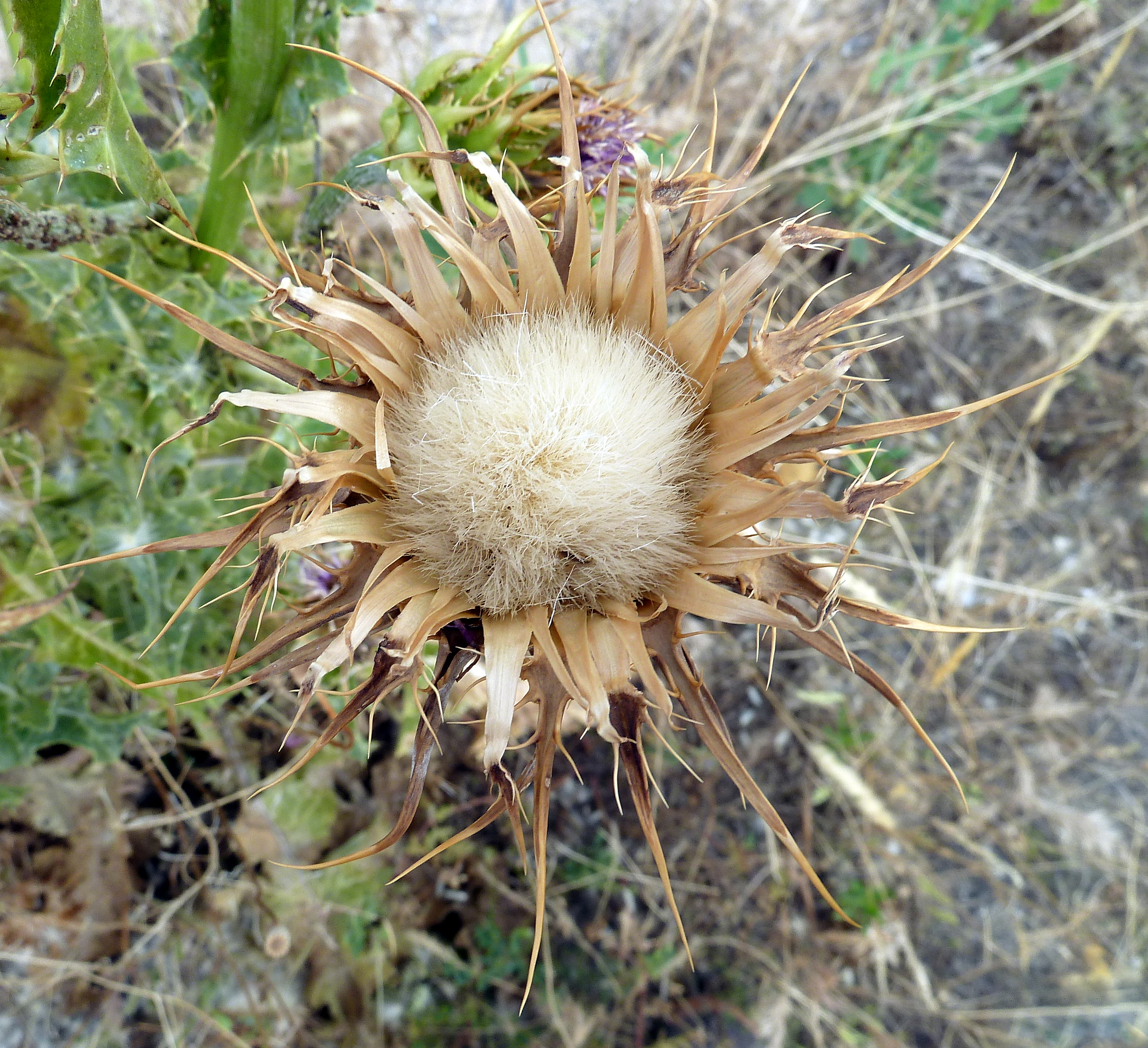 Silybum marianum: capítulo seco evidenciando las brácteas medias/internas y las páleas filiformes blancas del receptáculo. - FFCC Abroñigal-Embajadores (Madrid, España).